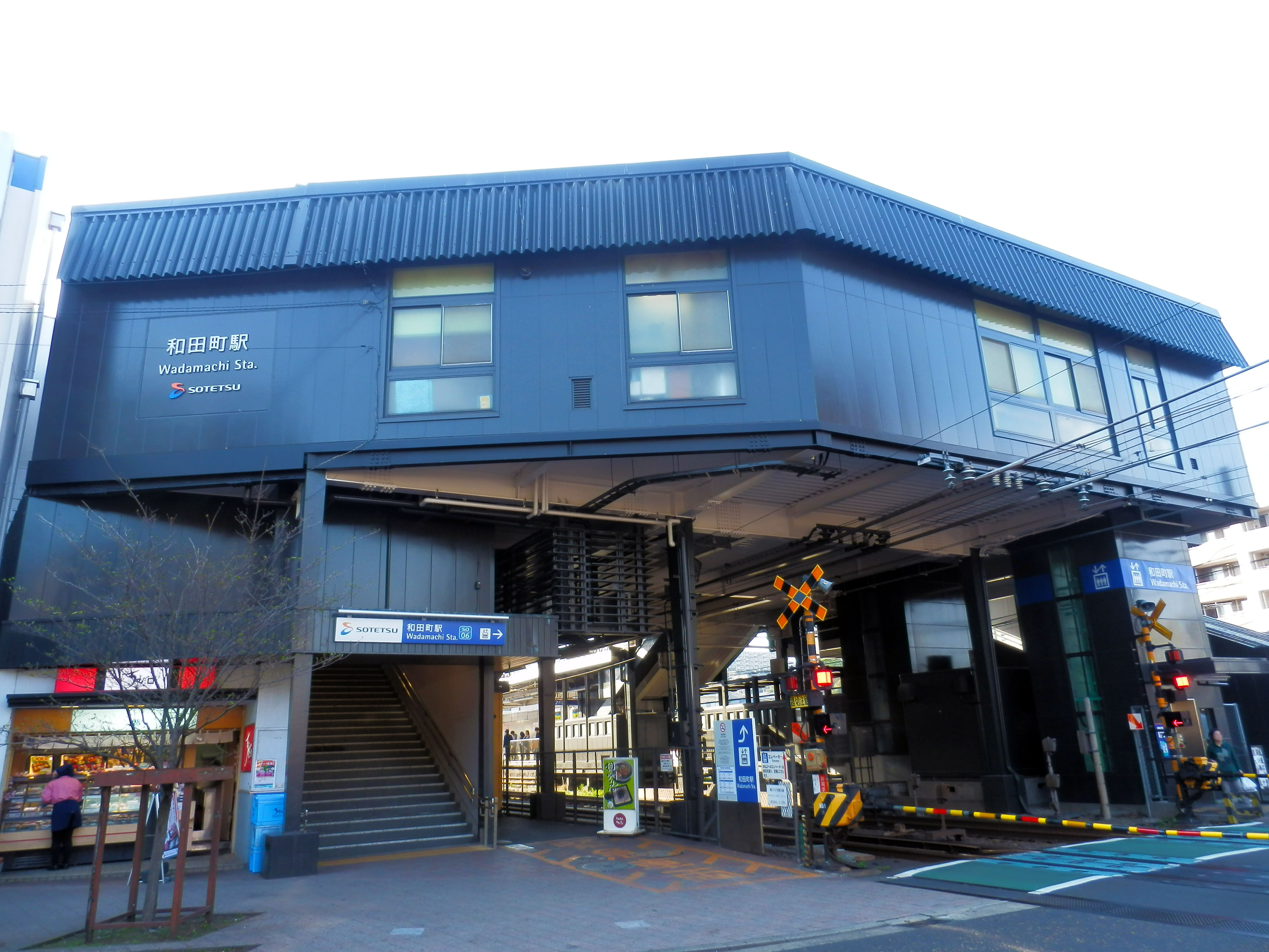 和田町駅（リニューアル後）